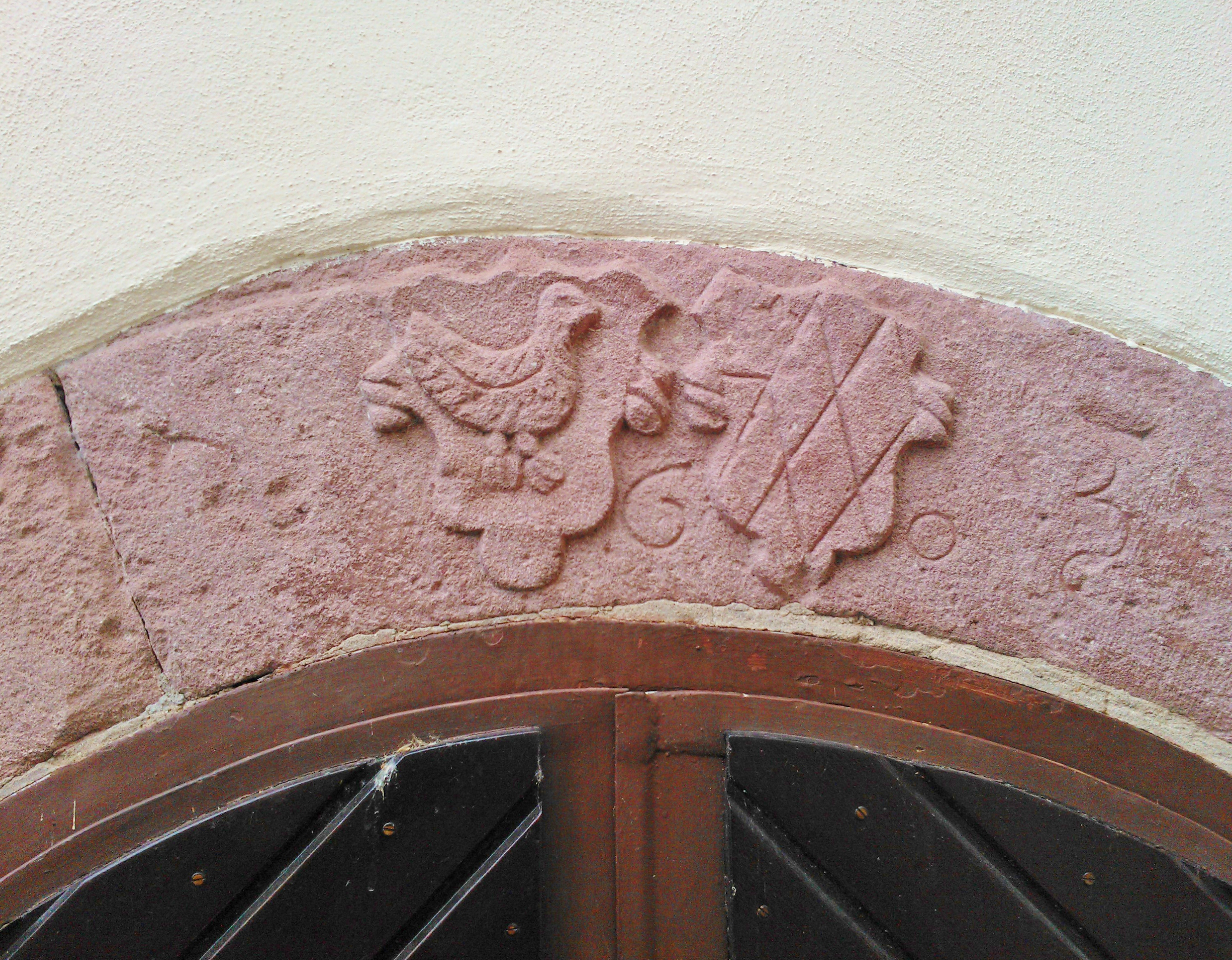 St. Josephshaus in Klein-Zimmern, ehemalige Wasserburg. Südflügel; Doppelwappen Gans v. Otzberg / Daun